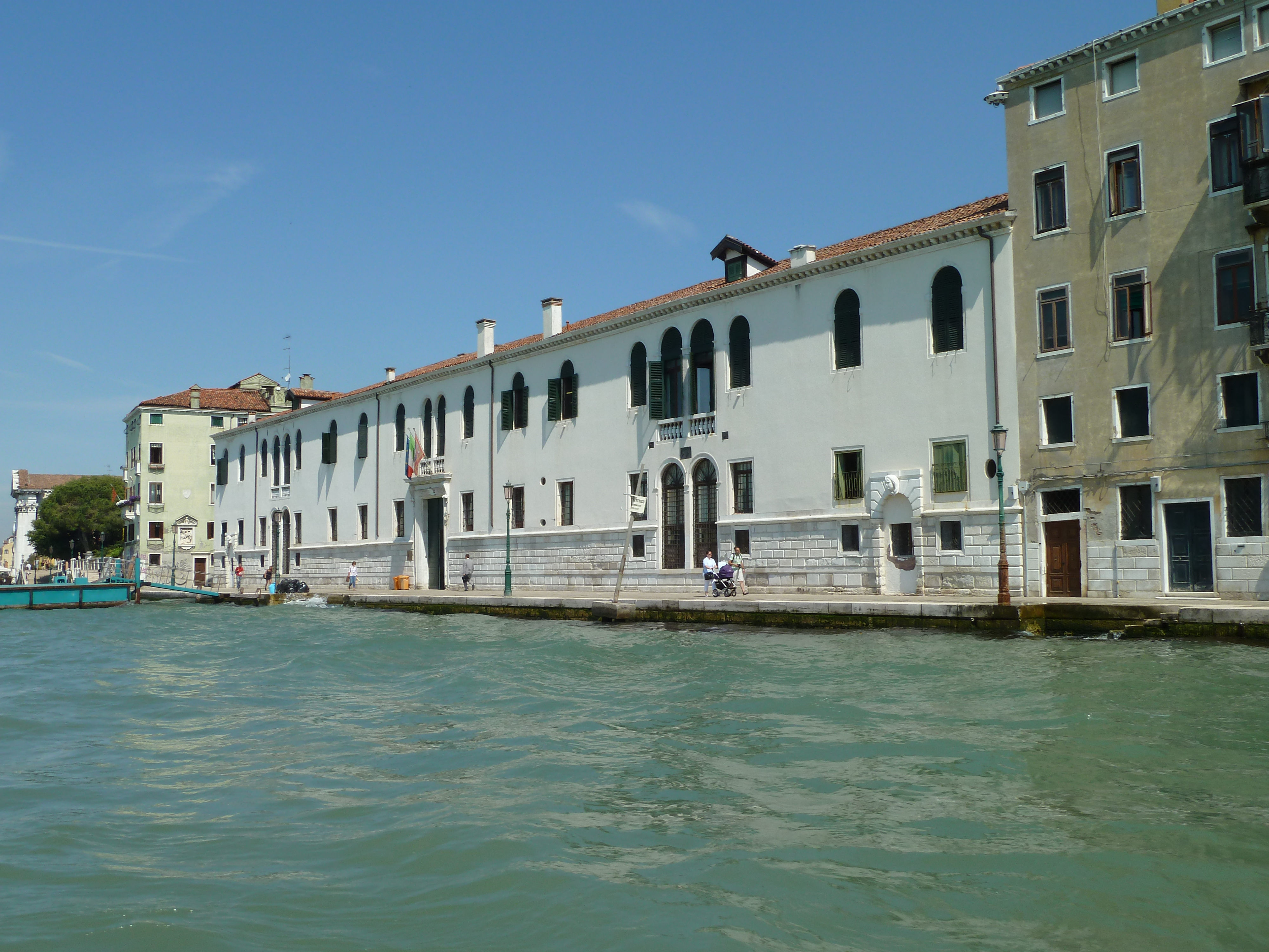 Casa degli Incurabili (Venice)